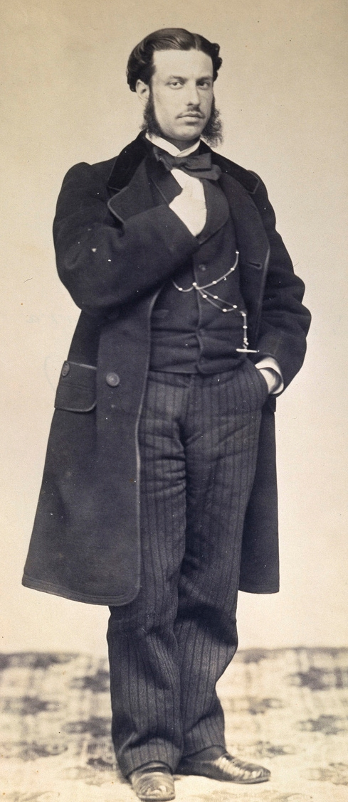 Fotografía del escritor español